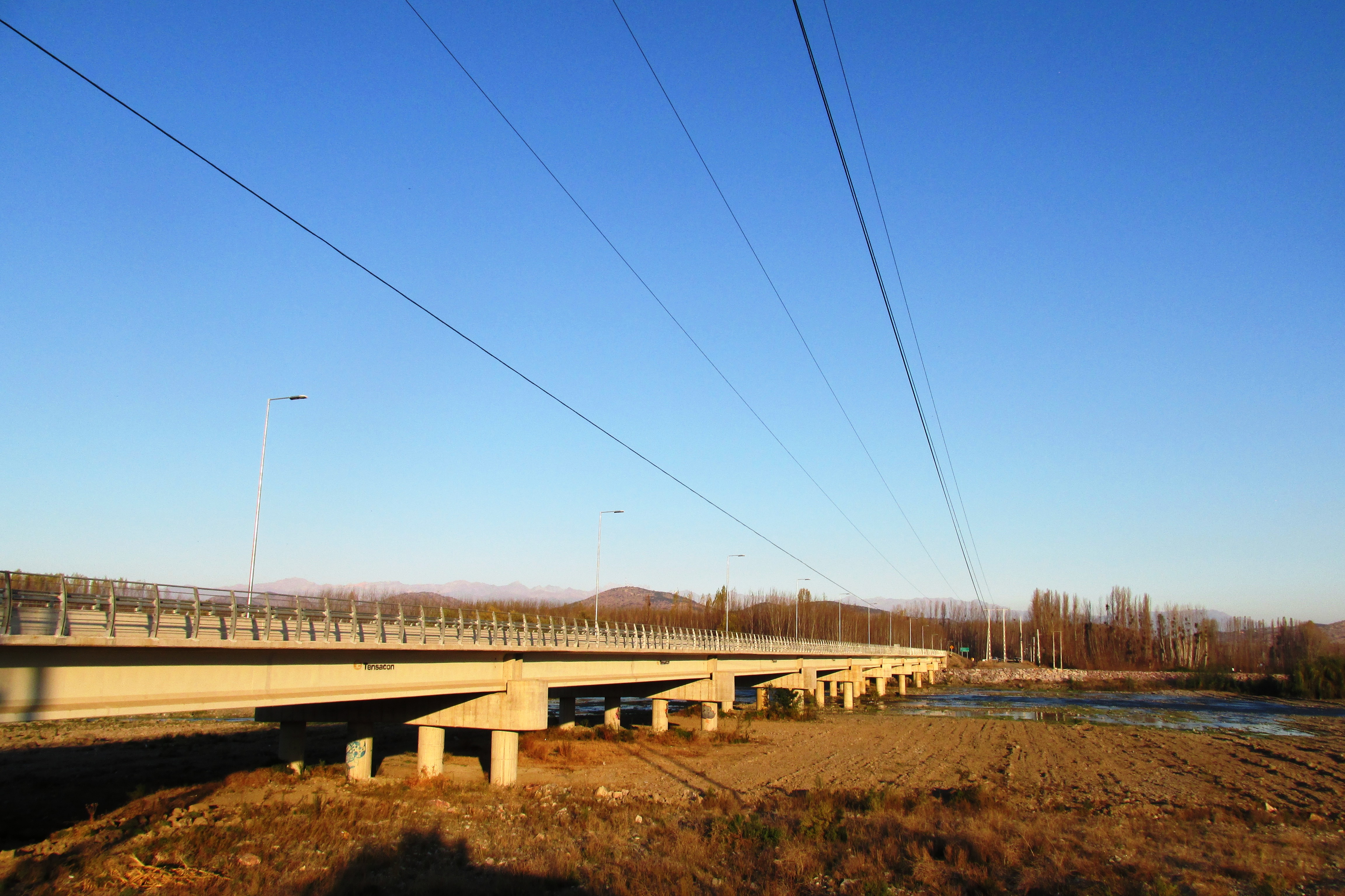 Vista Nuevo Puente Coinco, que une comuna de Doñihue y Coinco, región del Libertador Bernardo O"higgins Chile